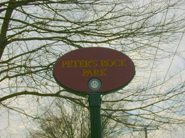 Peter's Rock Park in 2008